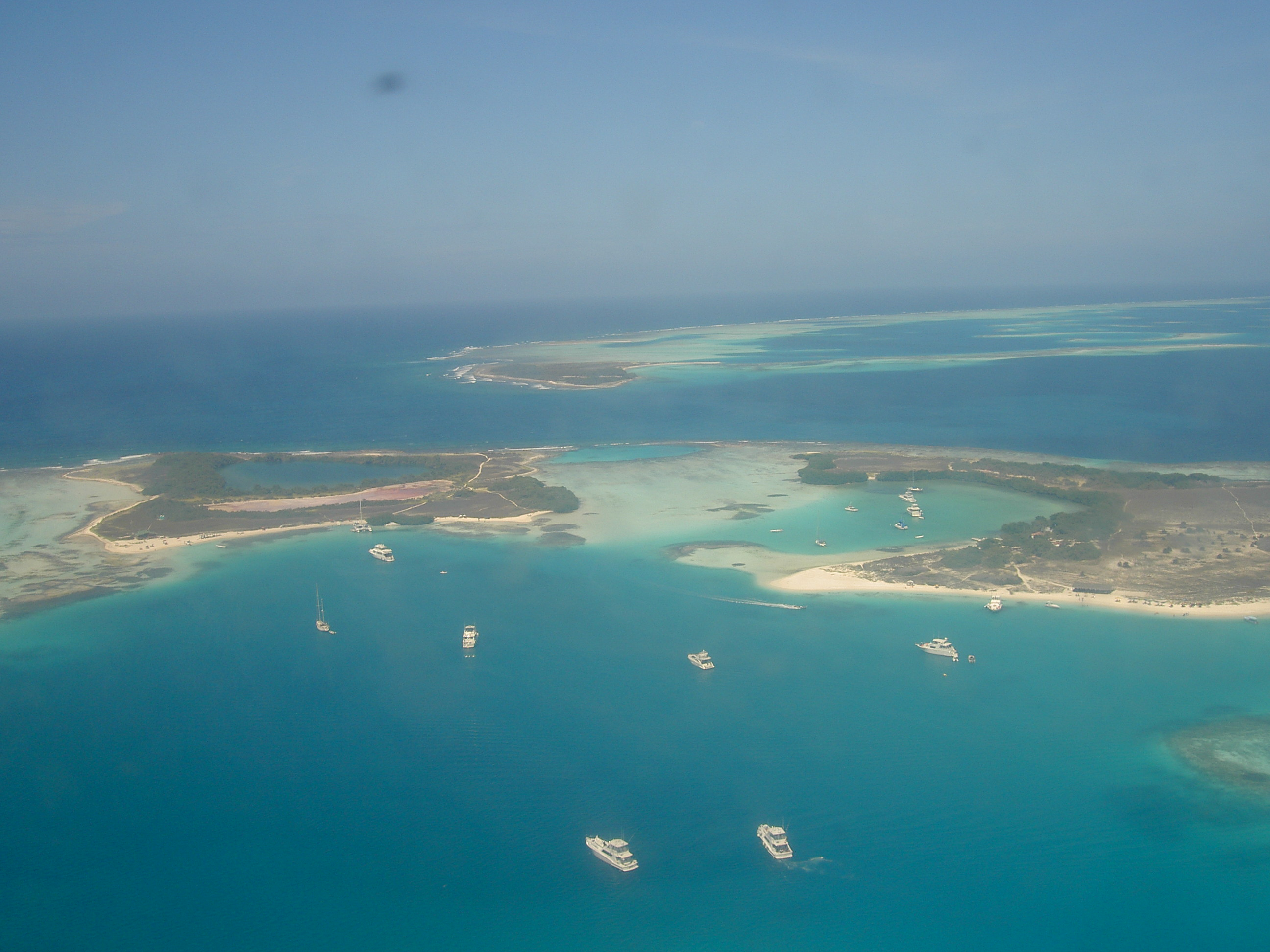 Toma aérea de Los Cayos de Francisquí. Autor: Pedro Sánchez (PSE)